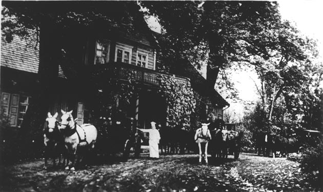 Biržuvėnų dvaras, XX a. pr.